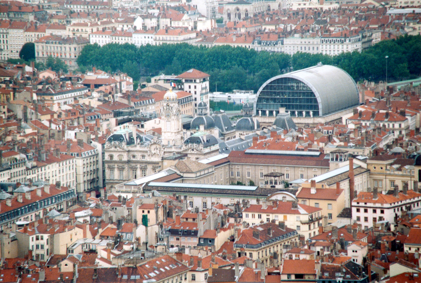 Lyon L'Hotel de Ville et l'Opéra vu depuis Fourvière Licensing Catégorie:Image de Lyon